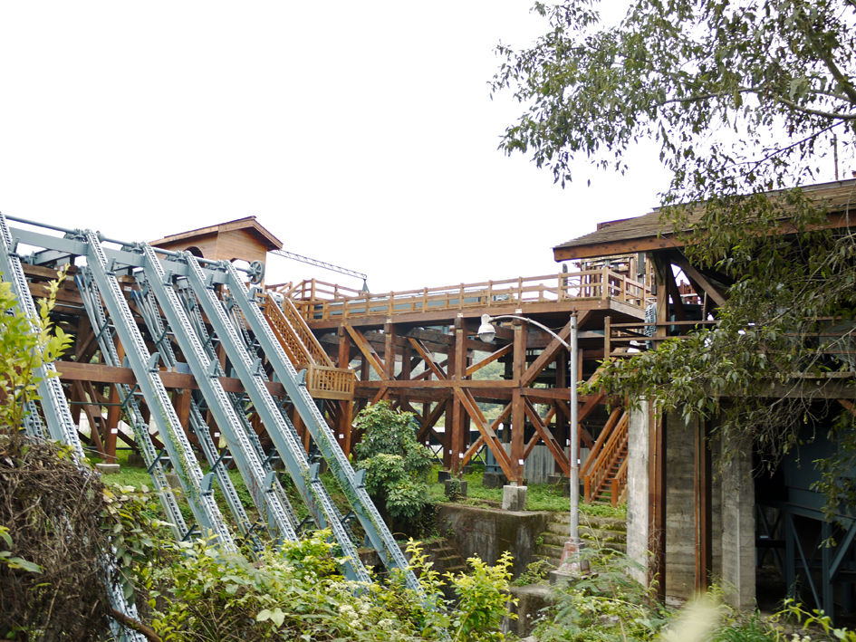 中文（台灣）: 大雪山製材廠（大雪山林業公司）